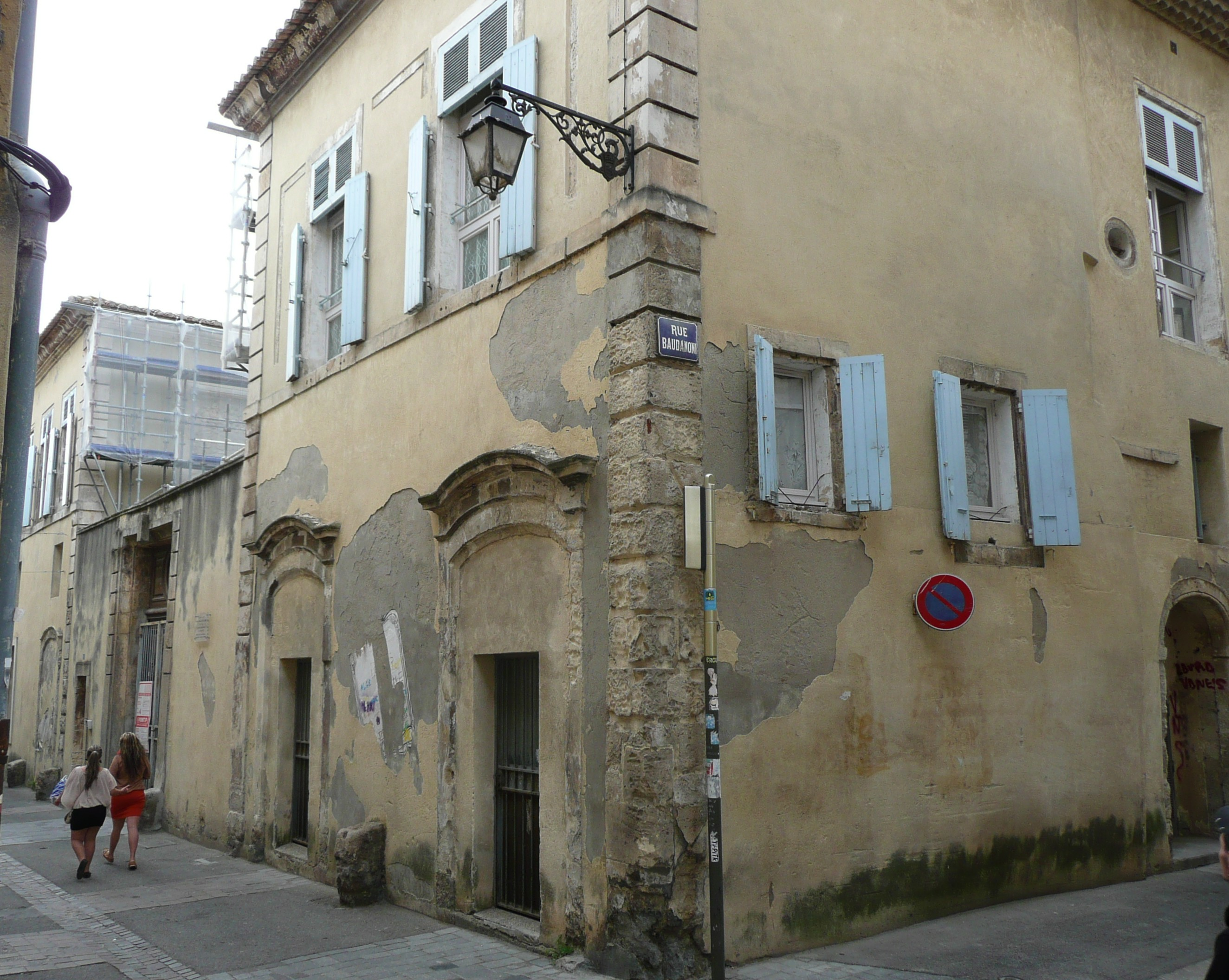 Au 30 rue de la Roquette, dans le quartier du même nom, à Arles (Bouches-du-Rhône), hôtel particulier d'Antonelle, angle avec la rue Baudanoni, rez-de-chaussée.